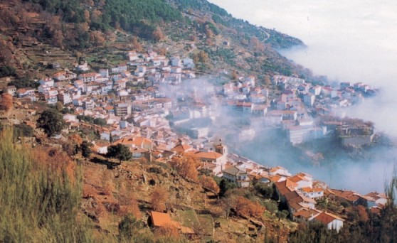 Pedrobernardo (comarca del Valle del Tiétar, en Ávila, España)